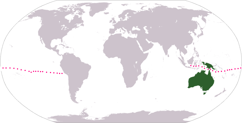 Edição sobre a imagem do Commons: Image:LocationAustralia.png mostrando a rota do navegador Torres